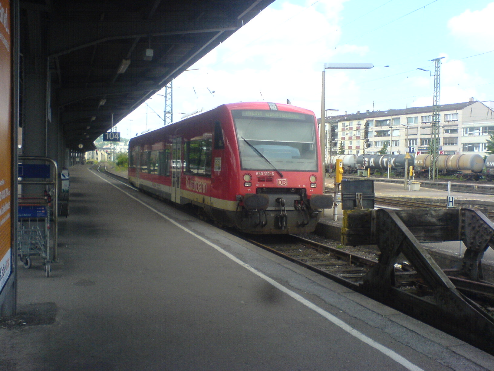 Pforzheim Hauptbahnhof